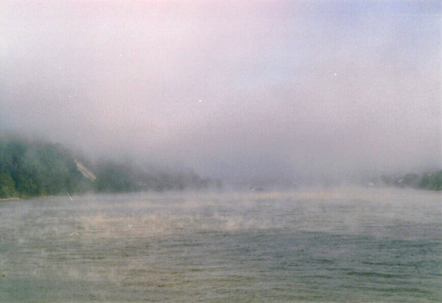 Rheinnebel